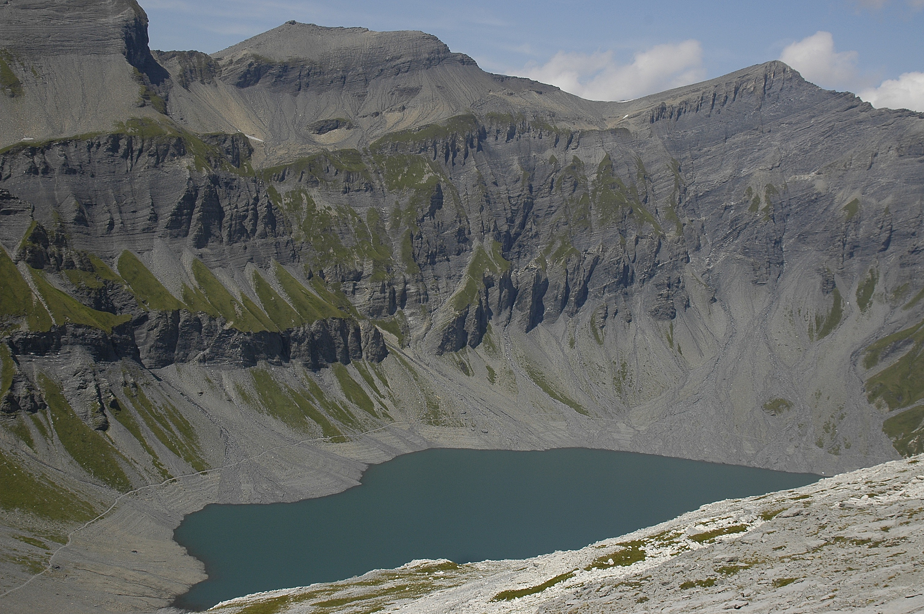 Une vue du lac du Vieux-Émosson depuis le haut de la petite Veudale.